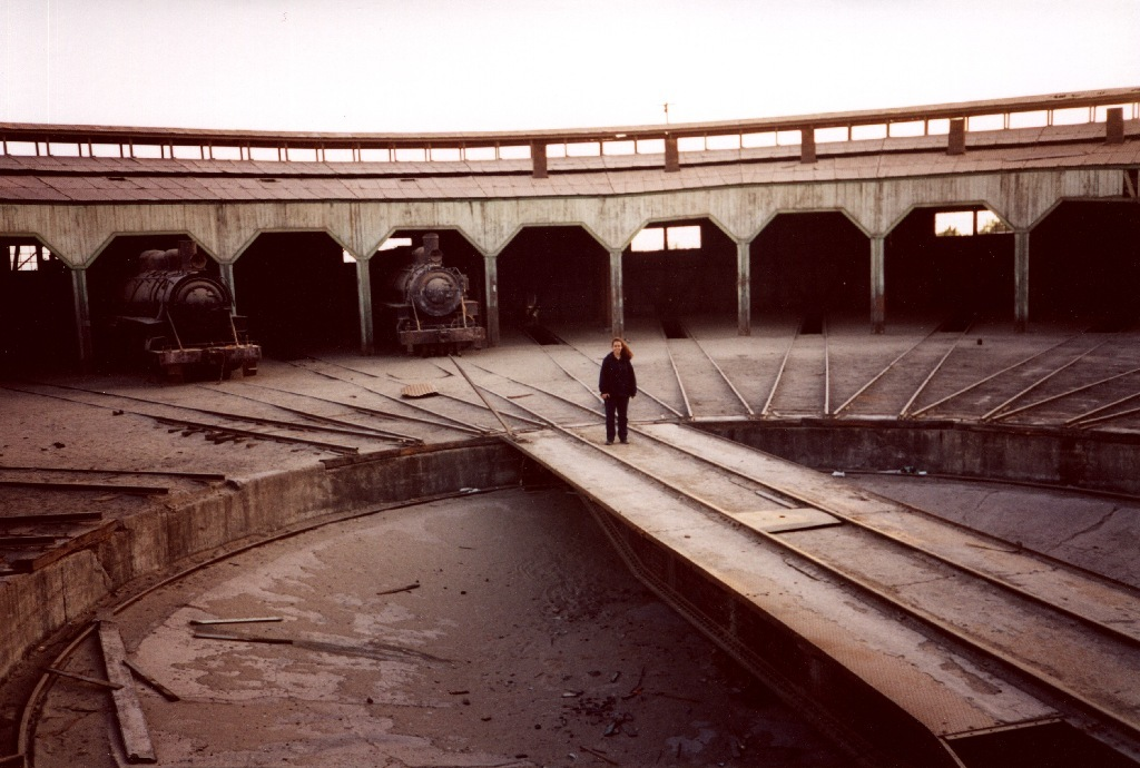 מתקן לחיוג רכבות בבאקדנו - צ'ילה